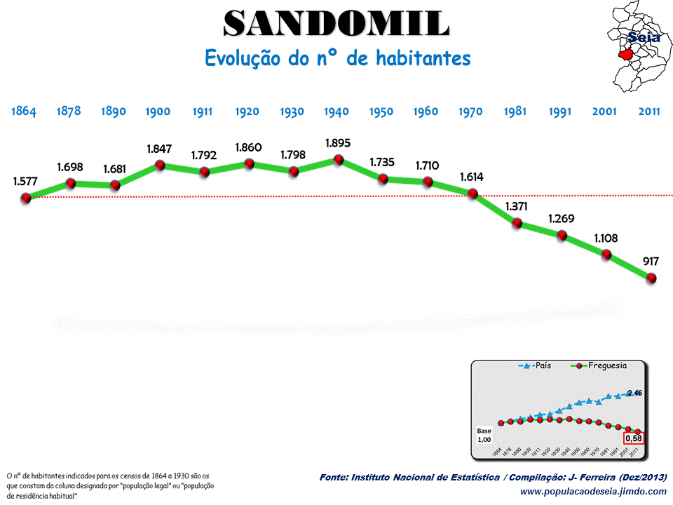 Evolução da População 1864 / 2011